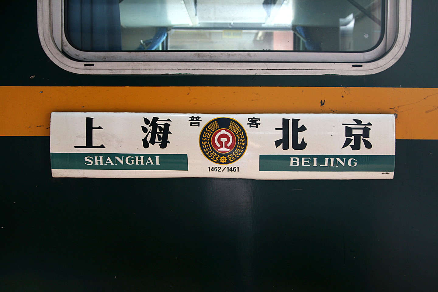 1461/1462次列车水牌。